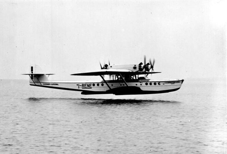 Zu dem grossen Flugboot-Unglück in der Ostsee! Das 4 motorige Dornier-Passagier-Flugboot, welches in der Ostsee kenterte und versank. 5 Passagiere werden vermisst.